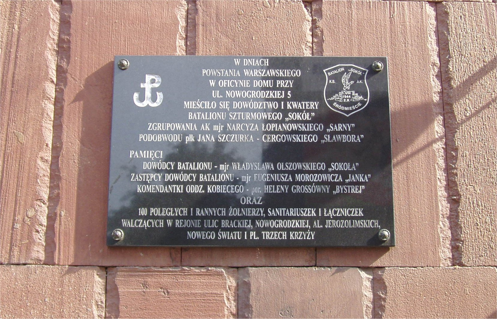 tablica pamiątkowa przy ul. Nowogrodzkiej w Śródmieściu Warszawy